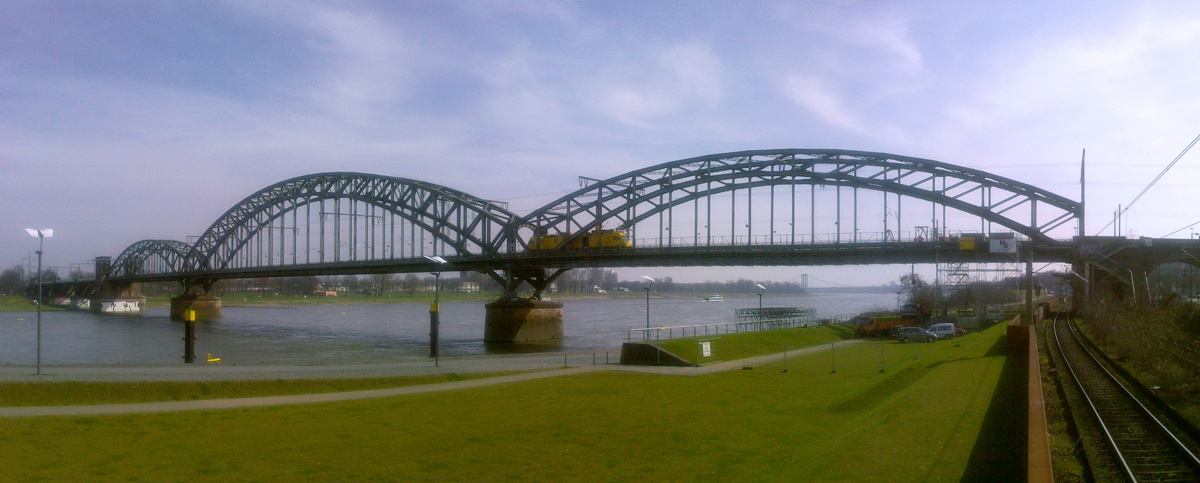 Kölner Südbrücke, vom Südkap Forum (Rheinauhafen) aus gesehen This is the photograph of an architectural monument. It is part of the list of cultural monuments of Köln, no. 7200